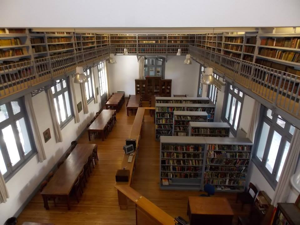 Sala de Lectura de la Biblioteca Central de Educación Secundaria "Dr. Carlos Real de Azúa", ubicada en el Instituto Alfredo Vázquez Acevedo.